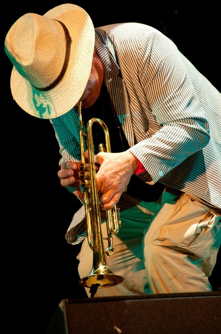 DURANTE UN CONCERTO